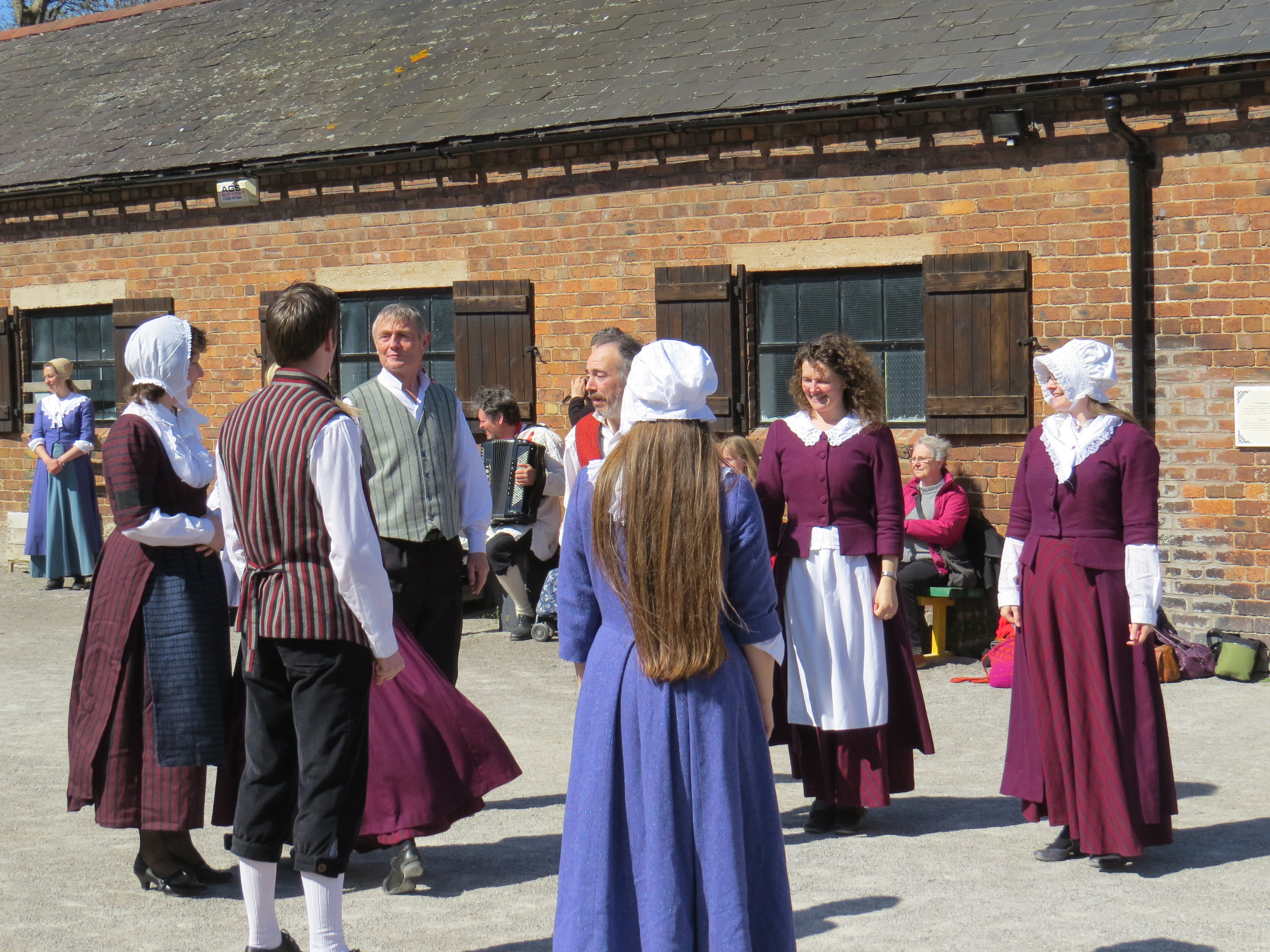 Dawnswyr Delyn ym Mharc Gwledig Maesglas